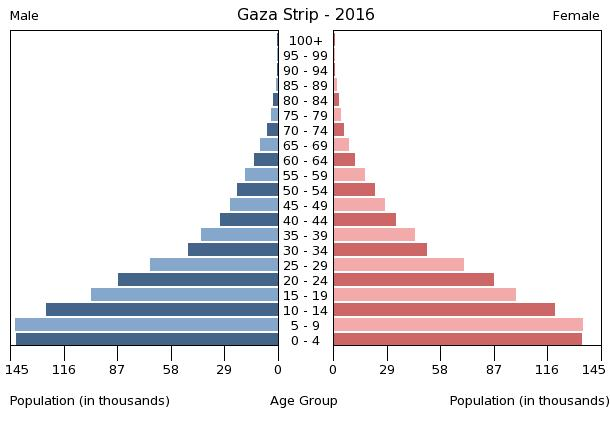 A population pyramid illustrates the age and sex structure of a country's population and may provide insights about political and social stability, as well as economic development. The population is distributed along the horizontal axis, with males shown on the left and females on the right. The male and female populations are broken down into 5-year age groups represented as horizontal bars along the vertical axis, with the youngest age groups at the bottom and the oldest at the top. The shape of the population pyramid gradually evolves over time based on fertility, mortality, and international migration trends.